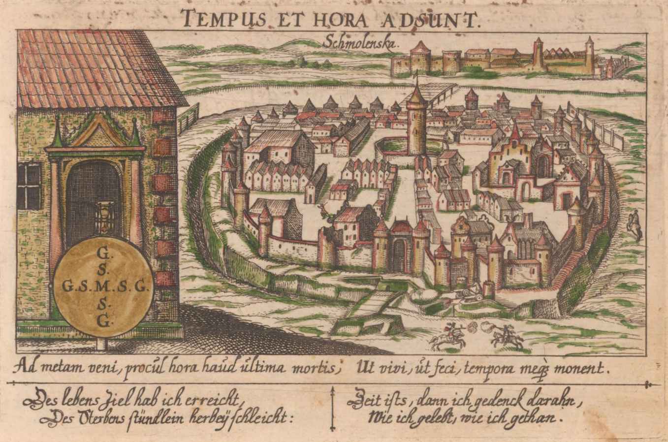 Беларуская (тарашкевіца): Смаленск (Smalensk). Плян места